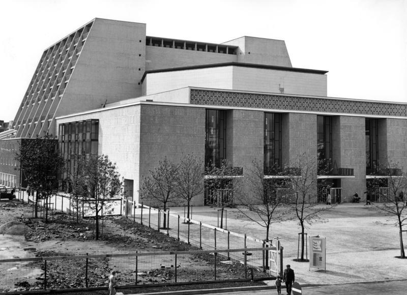 Köln (Nordrhein-Westfalen) Großes Haus